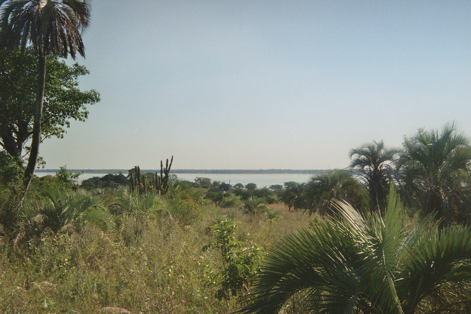 Parana River on Lavalle (Corrientes) Argentina